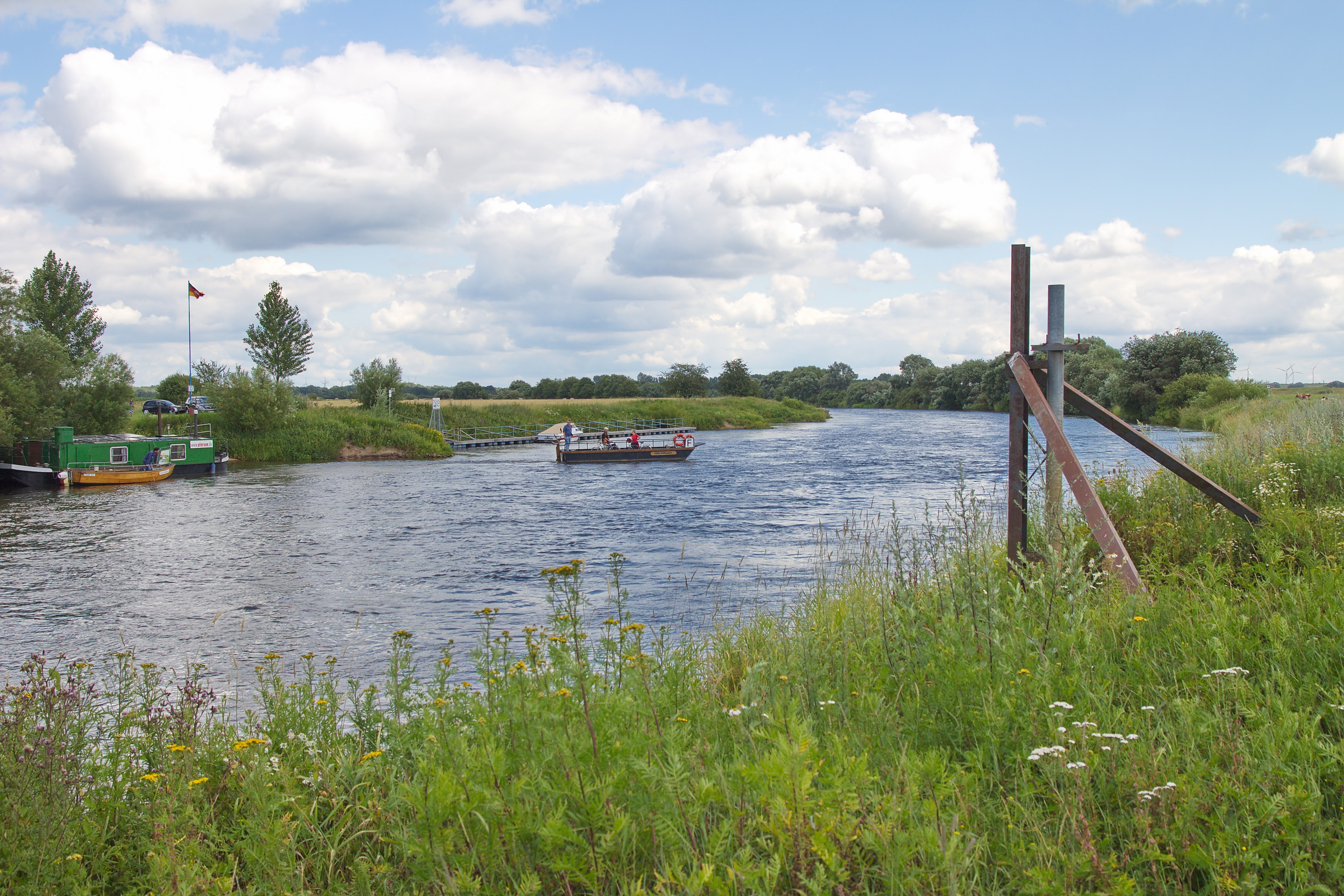 Allerfähre in Westen (Dörverden), Niedersachsen, Deutschland.